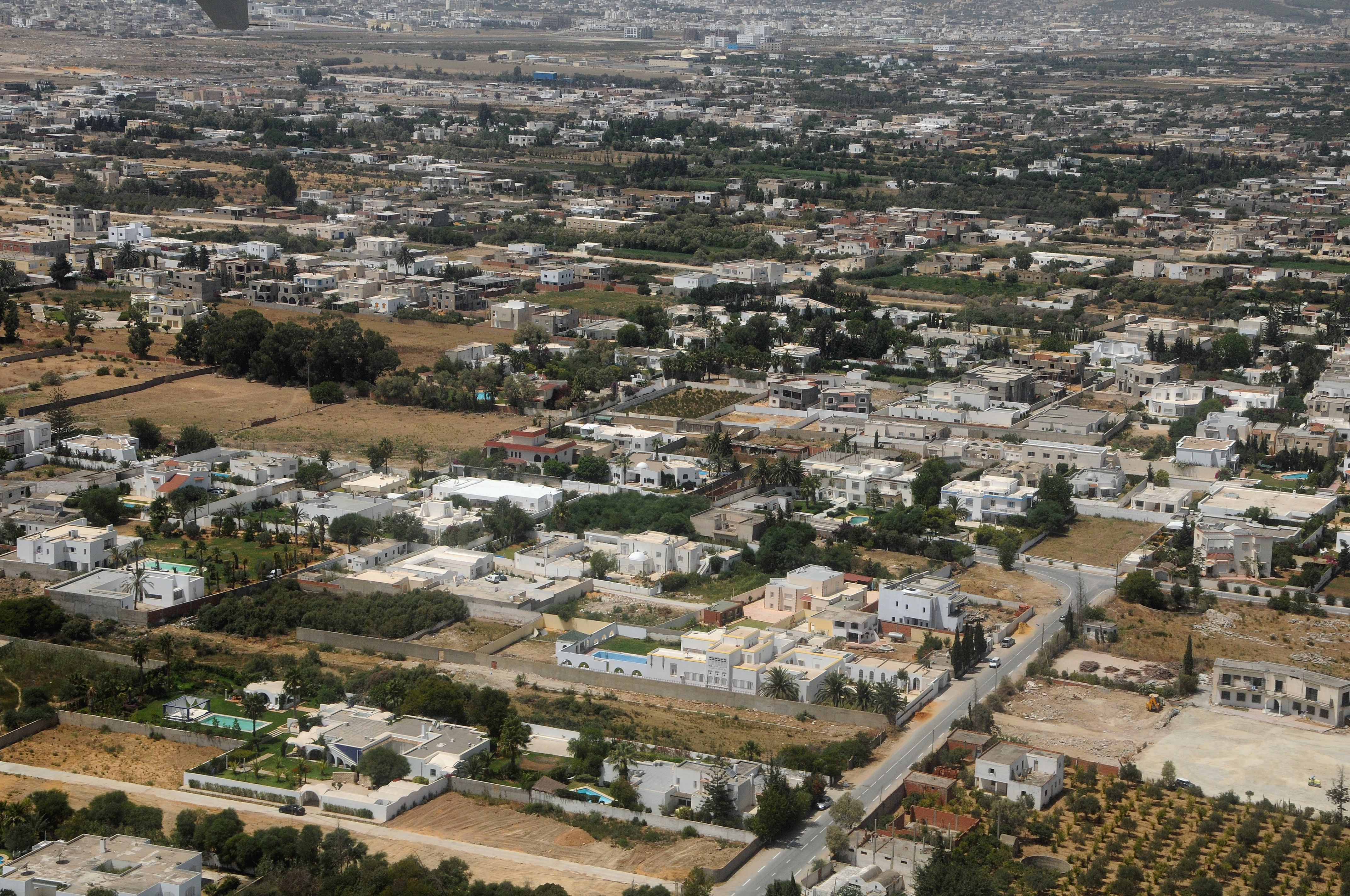 Vue aérienne de la cité Chotrana dans la banlieue nord de Tunis.